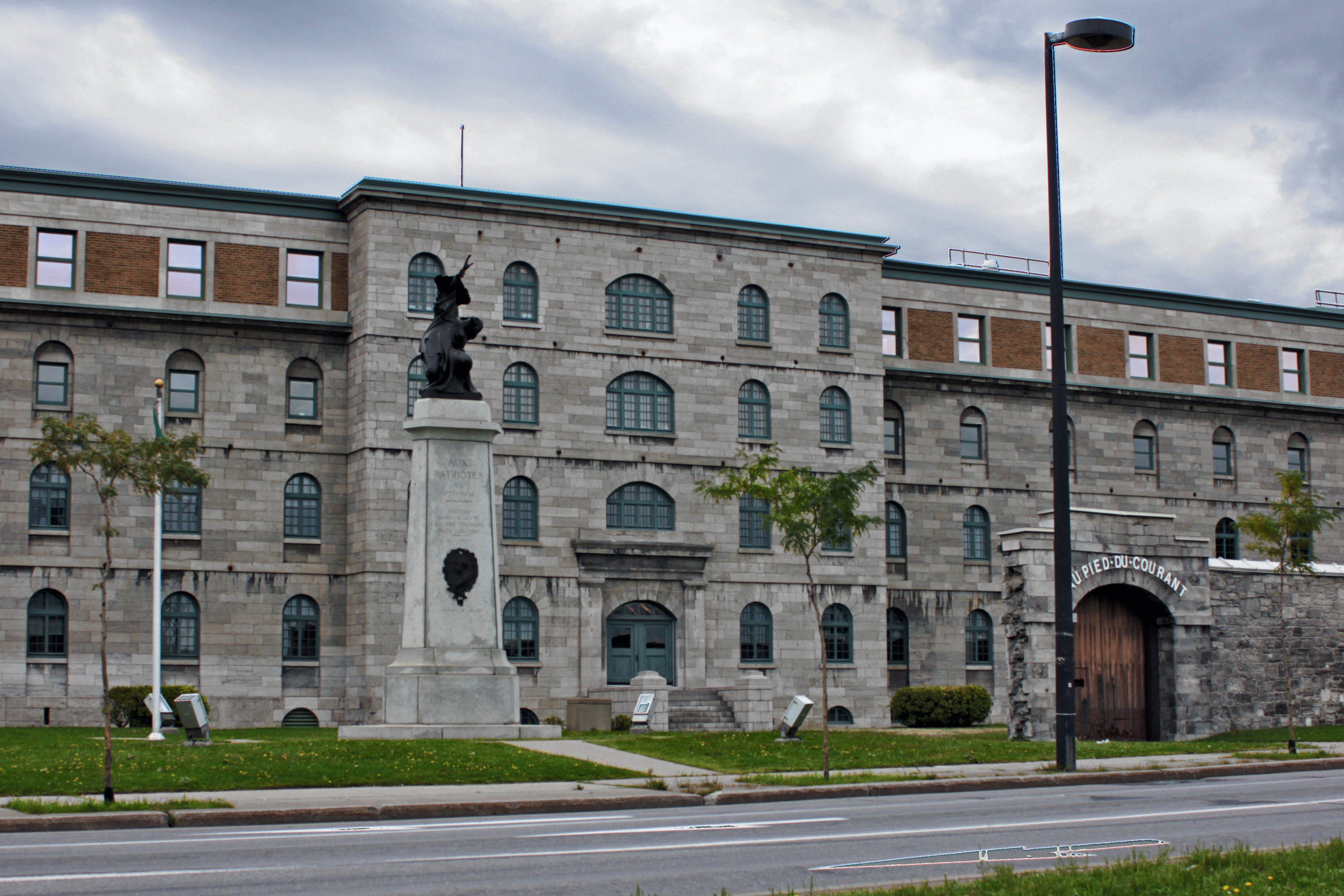 Façade de la prison du Pied-du-Courant à Montréal, Québec